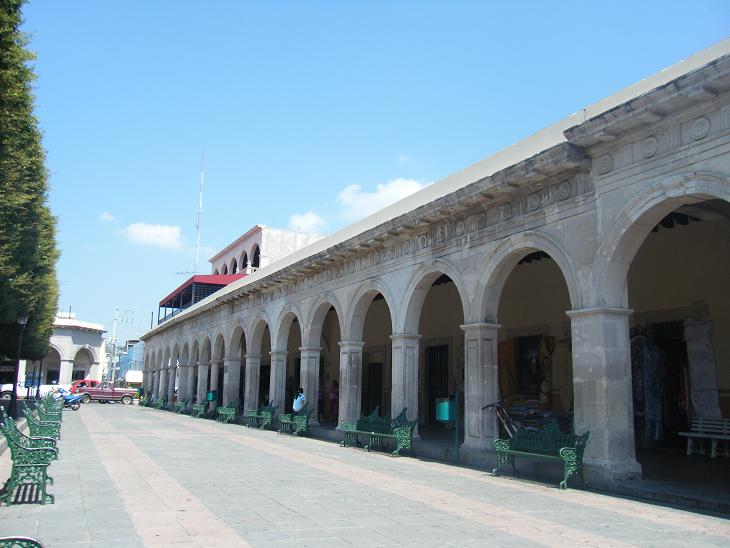 portales Uriangato 2009